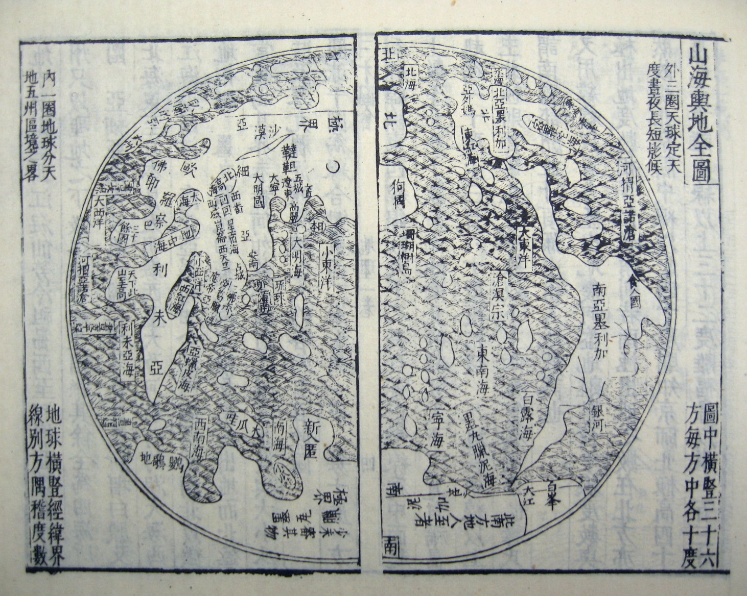 Shanhai Yudi Quantu (山海輿地全圖), the world map in Sancai Tuhui.